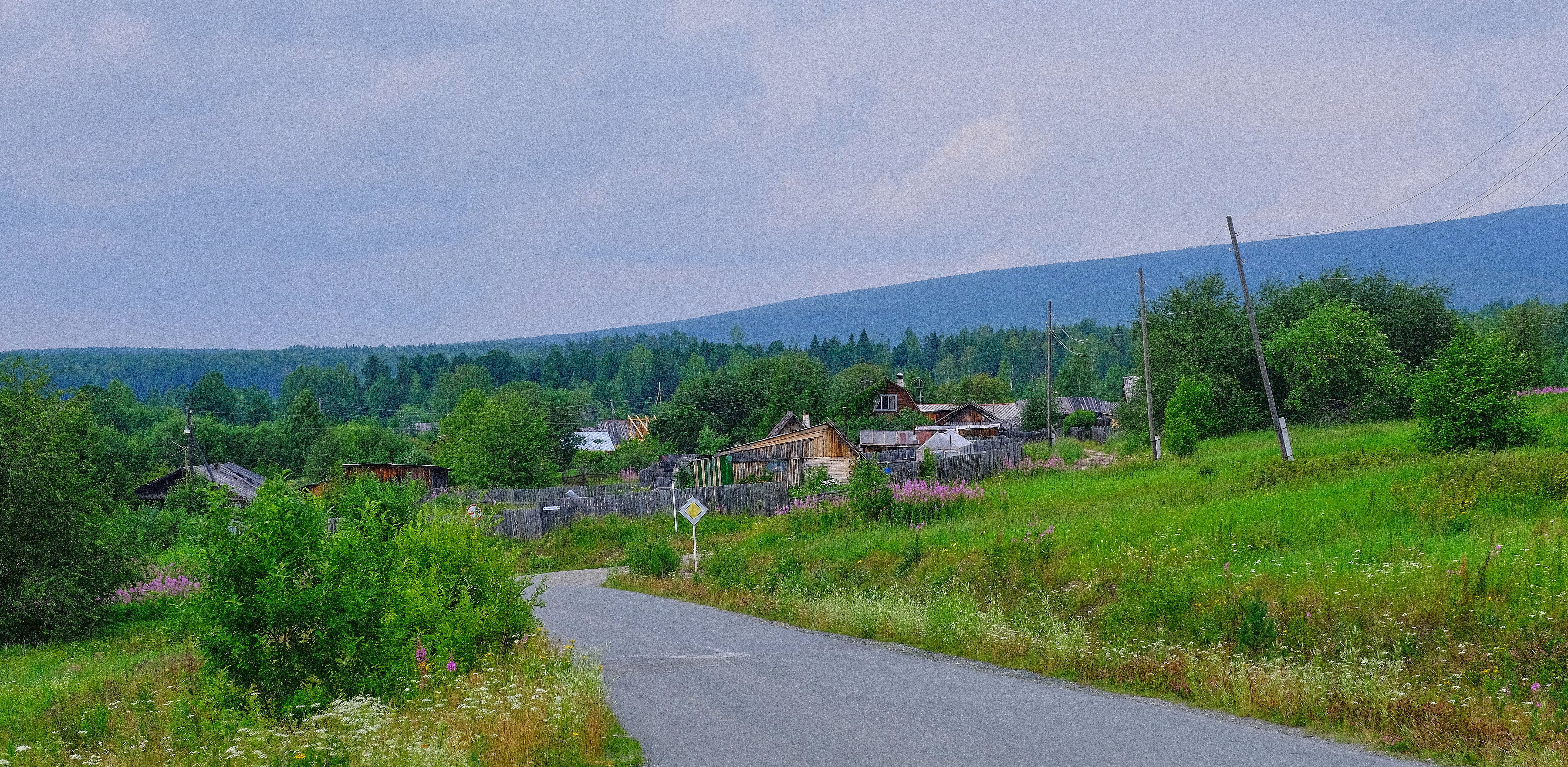 Посёлок Артельный, Нижнетуринский район, Свердловская область